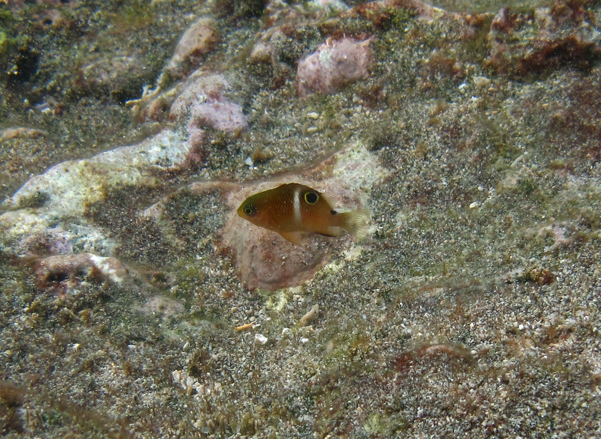 Une demoiselle à une barre (Plectroglyphidodon leucozonus) juvénile à la Réunion.